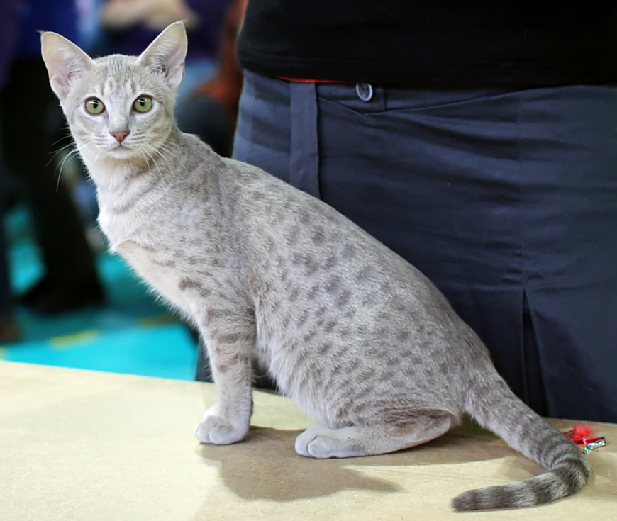 Topspot La Colombina, chaton femelle ocicat présentée en exposition féline à Kirkkonummi en Finlande en 2008. Couleur : Lilas spotted tabby Code FIFé : Topspot La Colombina (Liina) [OCI c 24] female kitten EX1